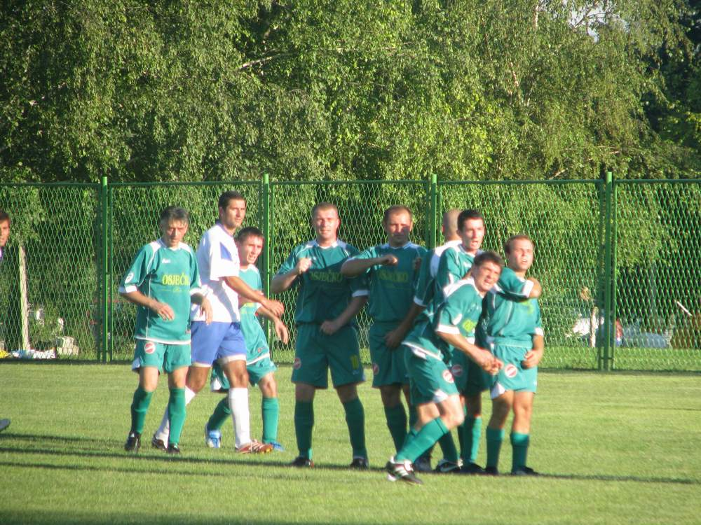 nogometni klub Nogometni klub "Columbus" 2005 Suza, Suza (Baranja)